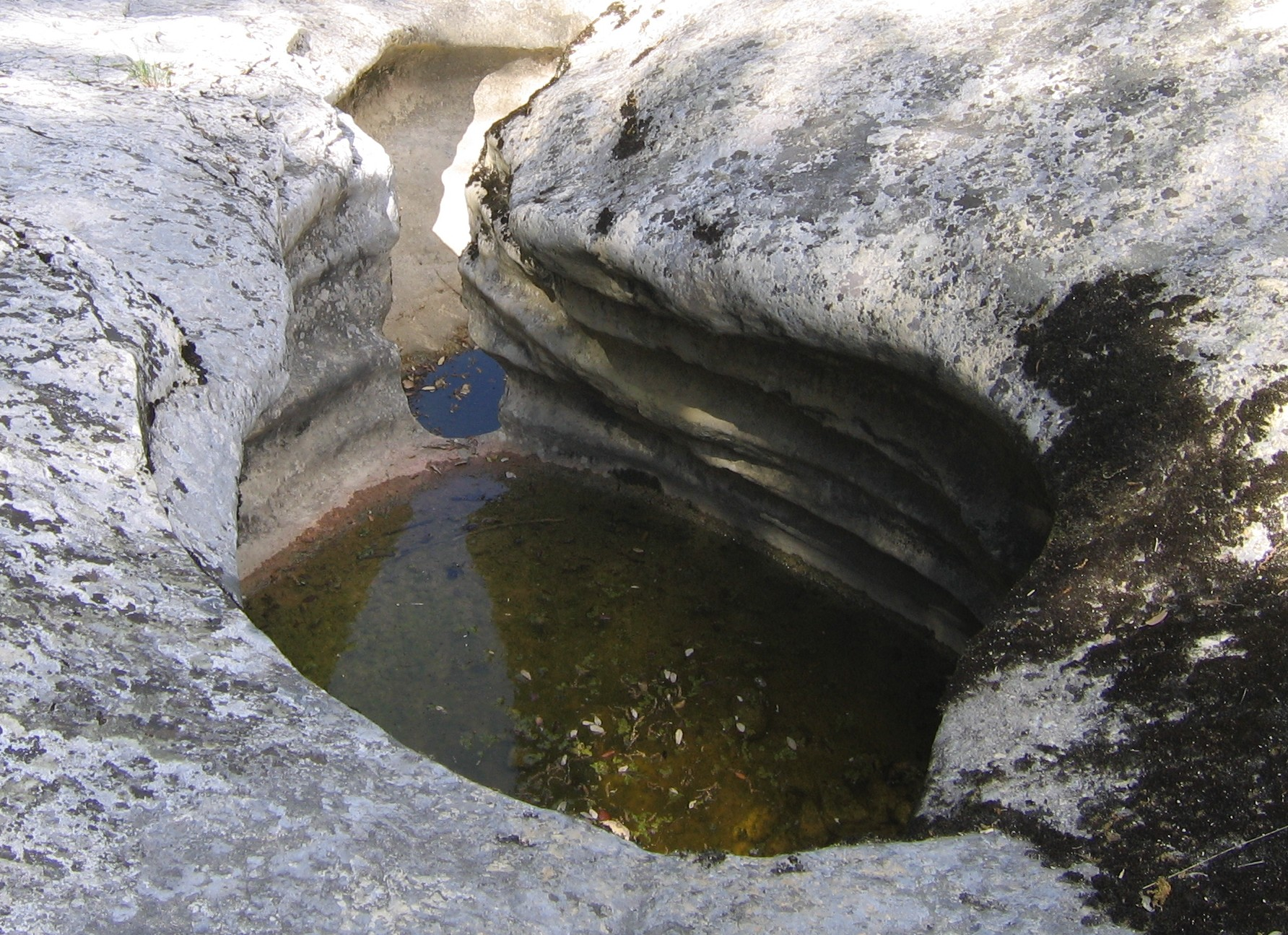 Marmite de géant, Gorges des Concluses (Gard, France)